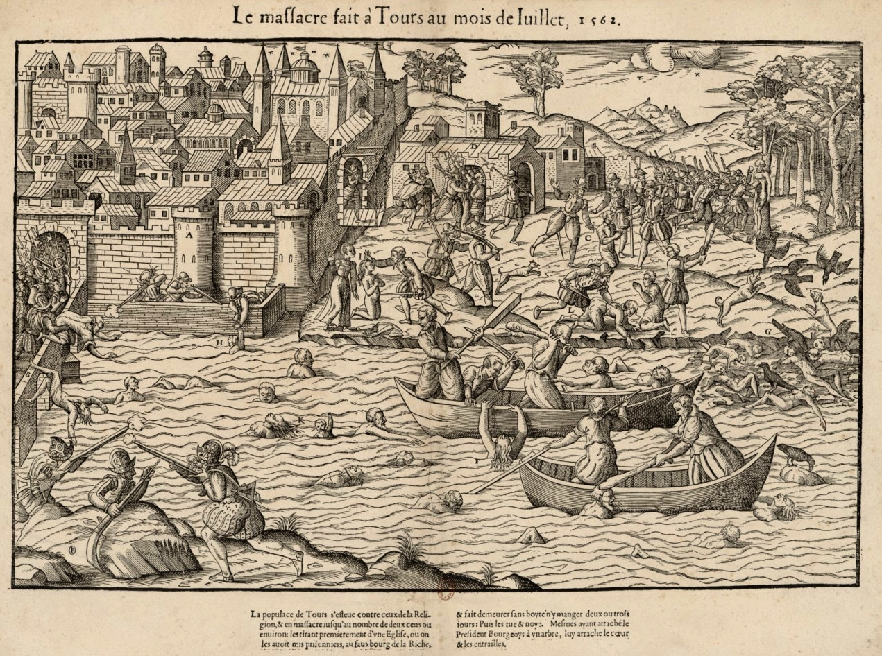 Gravure de Tortorel et Perrissin du Massacre de Tours, en juillet 1562. Version française de la gravure.